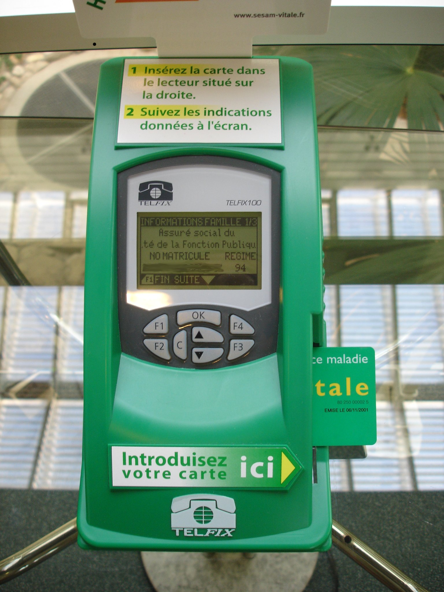 france, terminal de mise à jour des cartes vitales